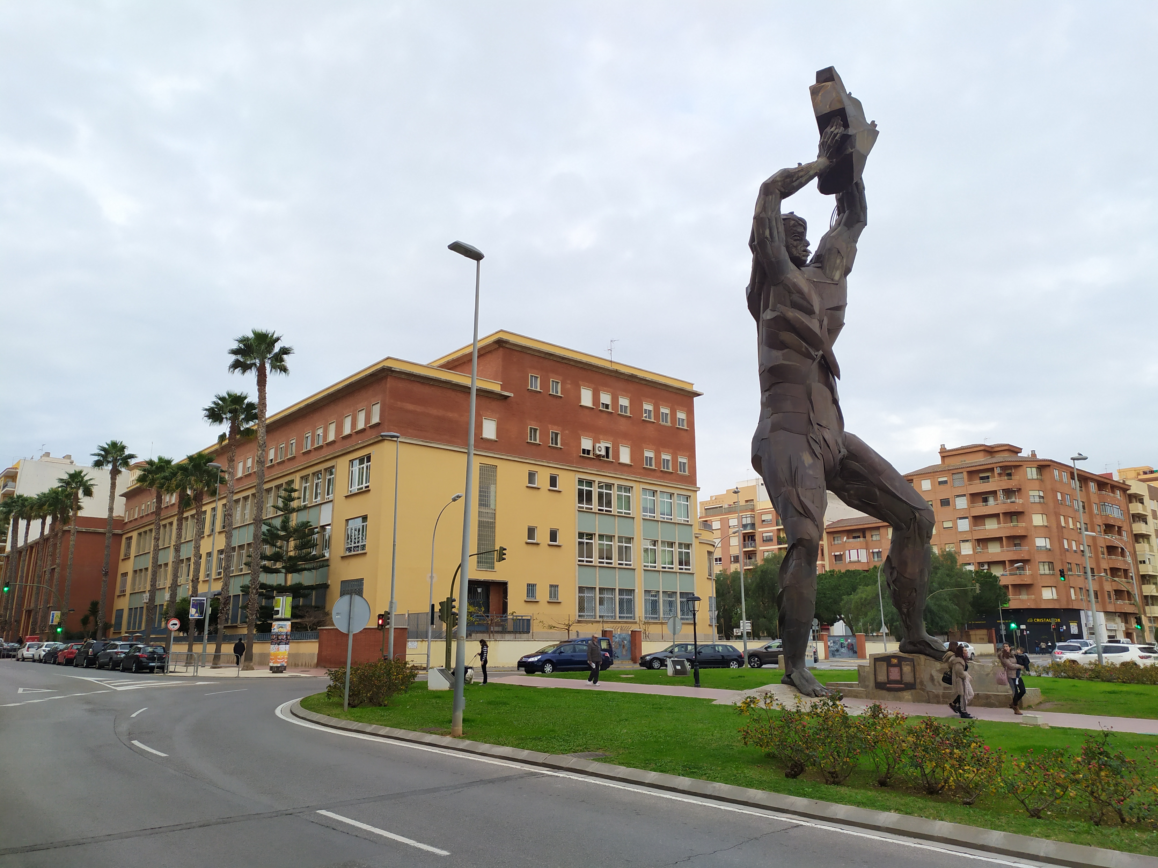 Tobatossals, personaje mitológico de Castellón